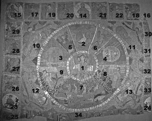 Numeració fragments del tapís de la creació. Girona.